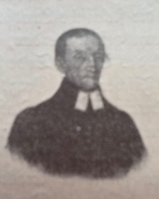 Prediger der Deutschen Evangelischen Kirchengemeinde A.B. in Preßburg